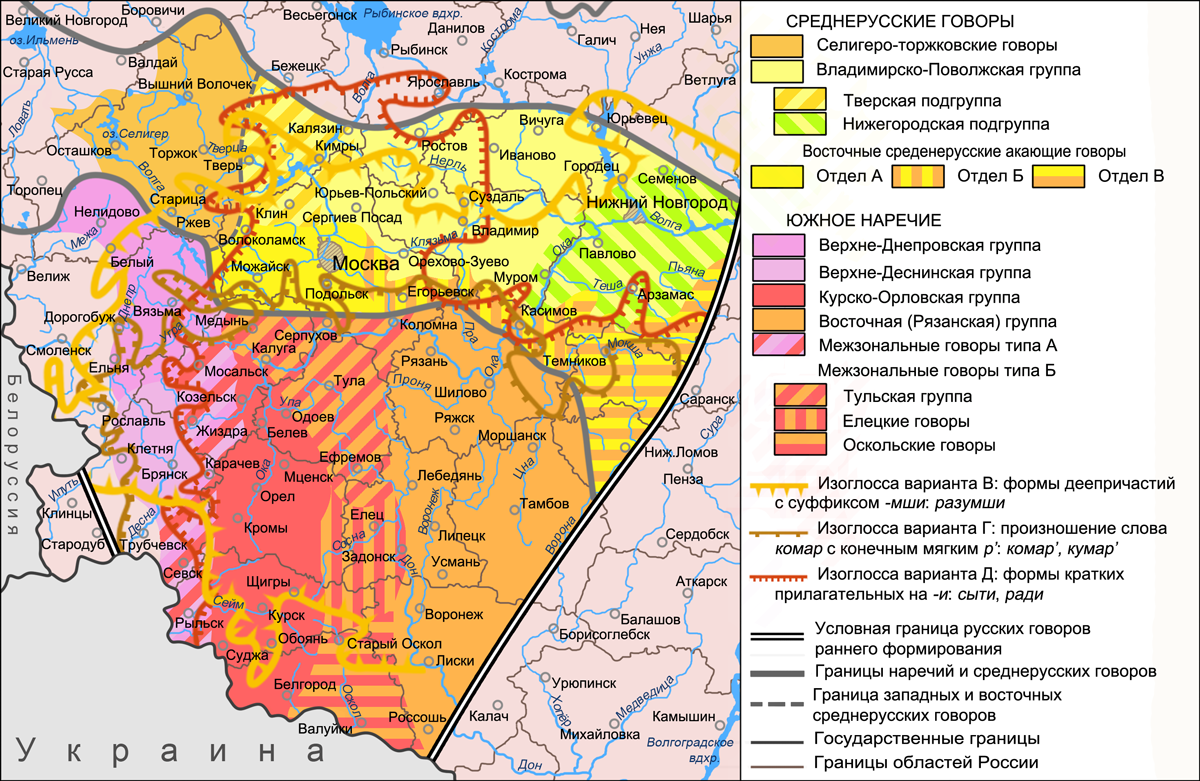 Карта южнорусских и среднерусских групп, подгрупп и отделов говоров в ареалах пучков изоглосс вариантов В, Г и Д юго-восточной диалектной зоны. Источники: Захарова К. Ф., Орлова В. Г. Диалектное членение русского языка — 2-е изд. — М.: Едиториал УРСС, 2004. — ISBN 5-354-00917-0, приложение: Диалектологическая карта русского языка (1964 г.). Касаткин Л. Л. Русские диалекты. Лингвистическая география Русские. Монография Института этнологии и антропологии РАН — М.: Наука, 1999, с. 96. Захарова К. Ф., Орлова В. Г. Диалектное членение русского языка — 2-е изд. — М.: Едиториал УРСС, 2004. — ISBN 5-354-00917-0, с. 103—104. Бромлей С. В., Булатова Л. Н., Захарова К. Ф. и др. Русская диалектология / Под ред. Л. Л. Касаткина — 2-е изд., перераб. — М.: Просвещение, 1989. — ISBN 5-09-000870-1, с. 205